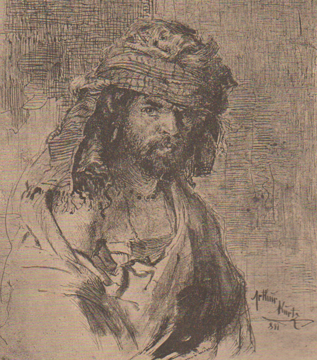 Zeichnung von Arthur Kurtz, 1891, vermutlich ein Selbstportrait des Künstlers